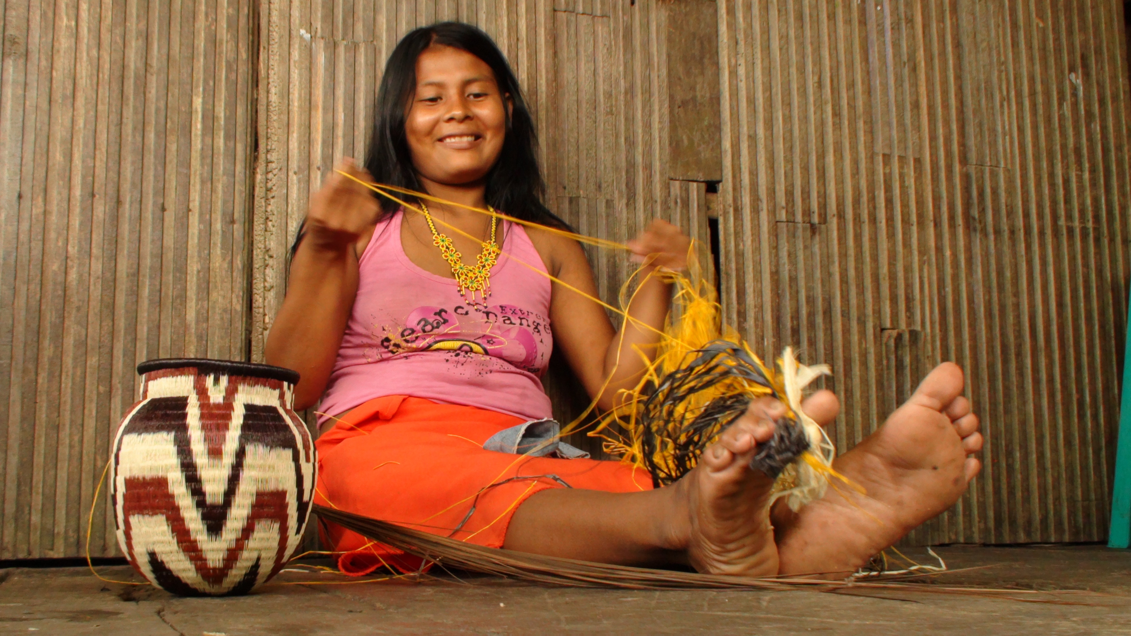 Sus artesanías se caracterizan por ser muy coloridas y de tejidos complejos que hablan de su entorno natural y su pensamiento cosmogónico. Esta fotografía fue tomada en el municipio colombiano con código 27250.